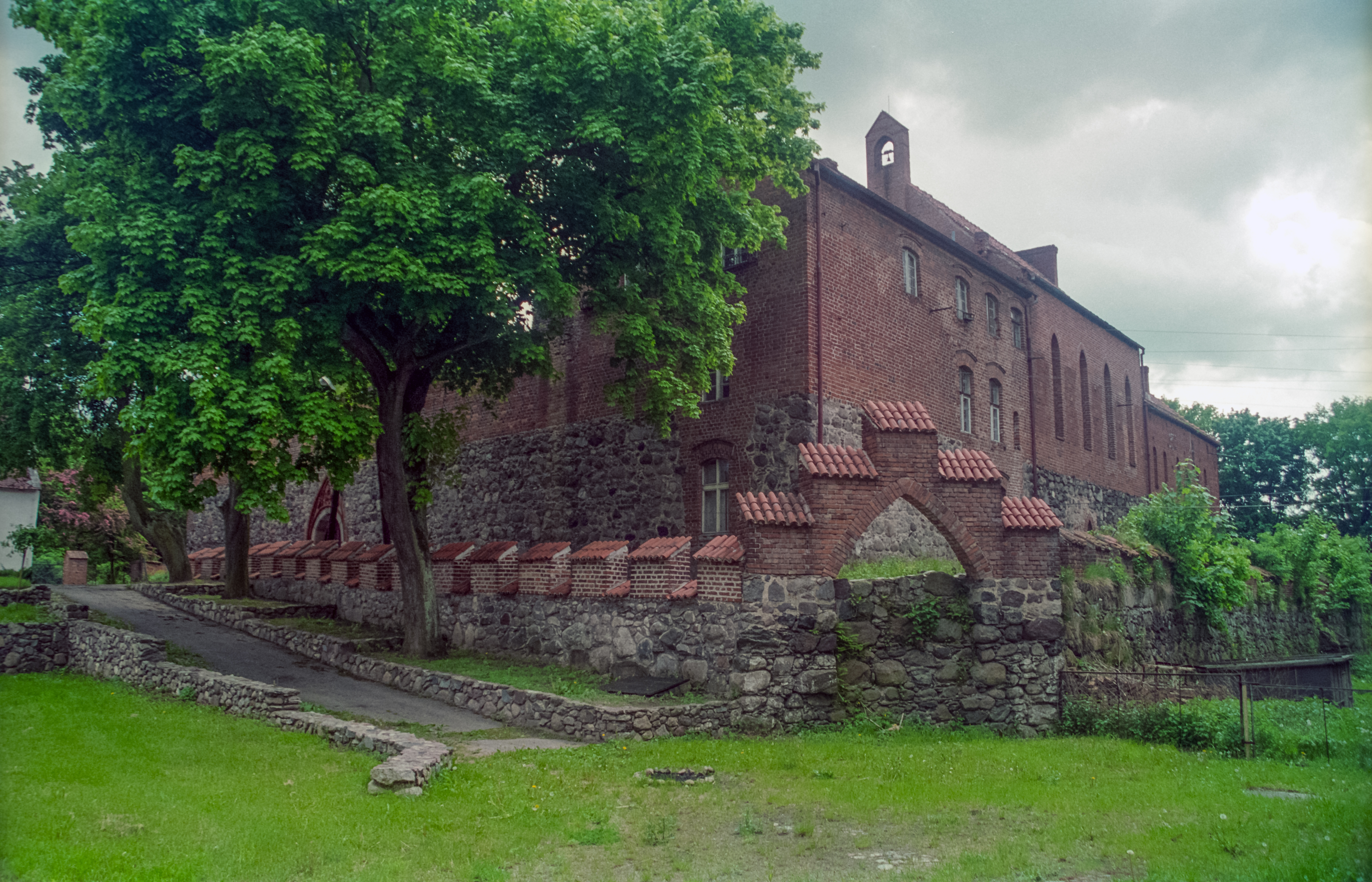 Bierzgłowo, zamek